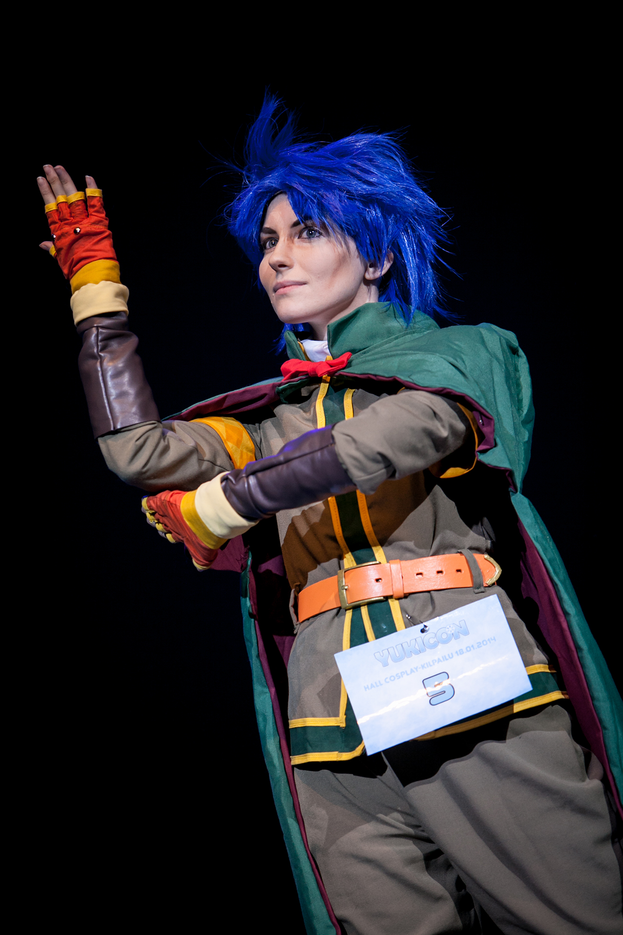 20140118173517IMG_5589